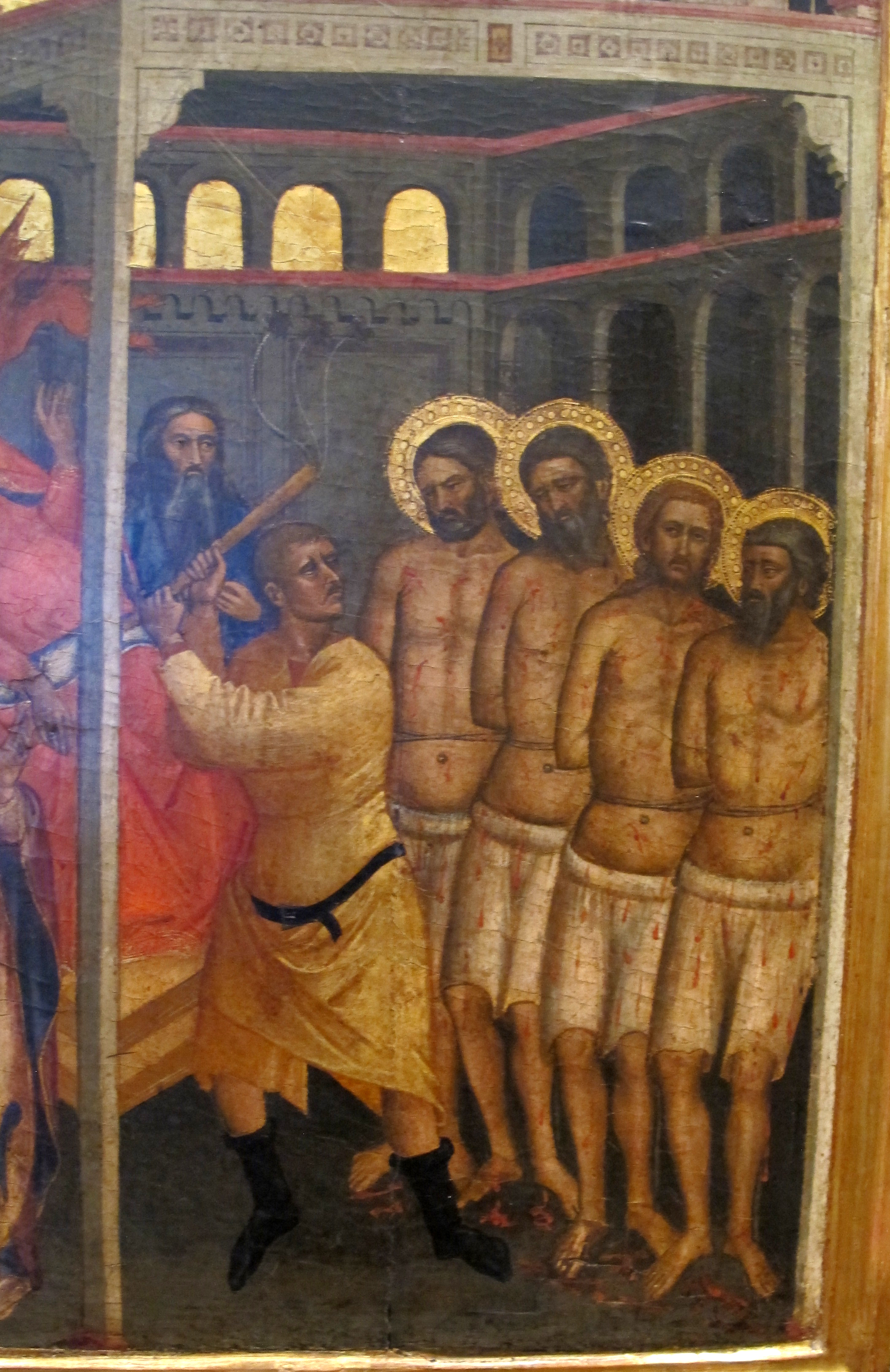 Philadelphia Museum of Art